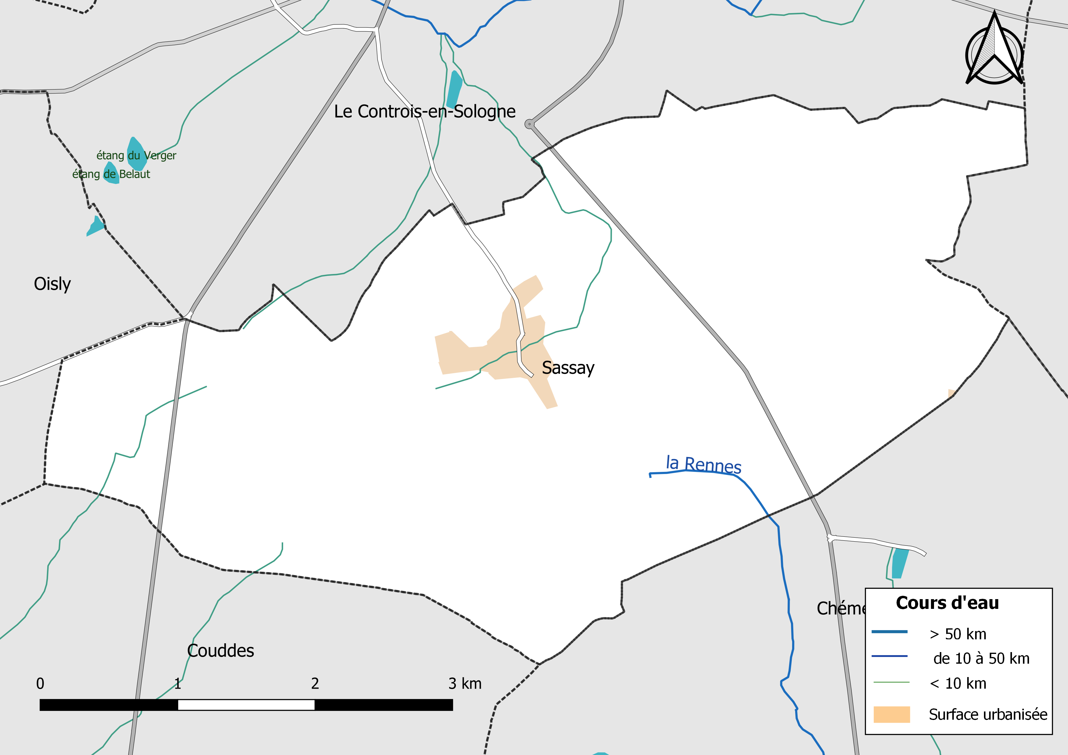 Carte du réseau hydrographique de la commune de Sassay (Loir-et-Cher, France).